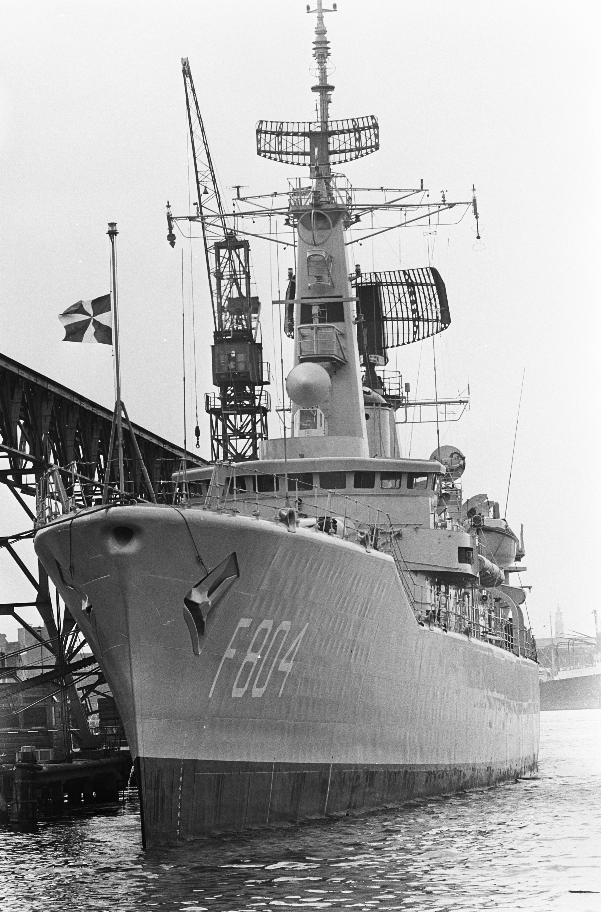 Collectie / Archief : Fotocollectie Anefo Reportage / Serie : [ onbekend ] Beschrijving : Indienststelling Fregat Hr. Ms. "Tjerk Hiddes" bij NDSM werf. "De Geus" waait halfstok. Datum : 16 augustus 1967 Locatie : Amsterdam Trefwoorden : marine, schepen Instellingsnaam : NDSM Fotograaf : Nijs, Jac. de / Anefo Auteursrechthebbende : Nationaal Archief Materiaalsoort : Negatief (zwart/wit) Nummer archiefinventaris : bekijk toegang 2.24.01.05 Bestanddeelnummer : 920-6049